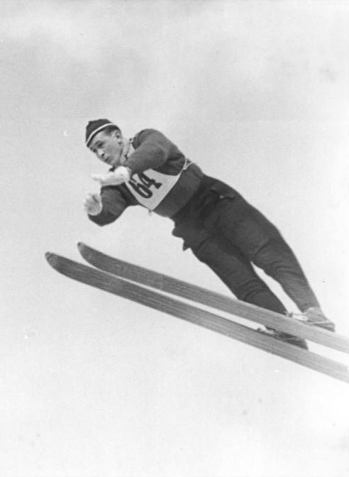 Zentralbild Tbd-Wlocka 27.2.1954 5. Wintersportmeisterschaften der Deutschen Demokratischen Republik vom 25. - 28.2.1954 in Oberhof An diesen Wintersportmeisterschaften nehmen Gäste aus Frankreich, der Volksrepublik Polen, der Ungarischen Volksrepublik und Westdeutschland teil. - Am 26.2.1954 wurde auf der Thüringer-Schanze der Kombinations-Sprunglauf durchgeführt. UBz: Herbert Leonhardt von der Sportvereinigung "Aufbau" wurde mit der Note 197 Zweiter.